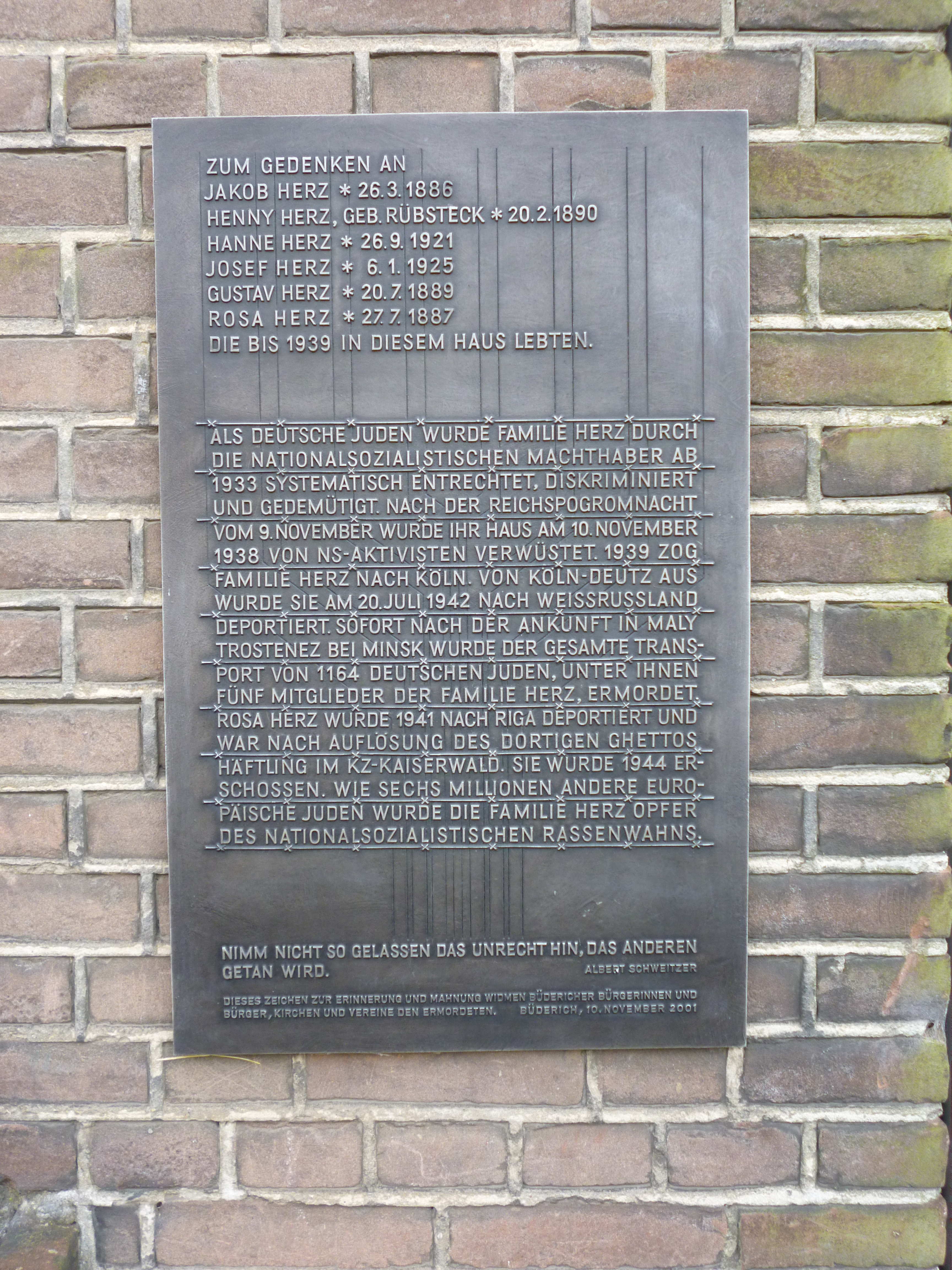 Tafel zum Gedenken an die Opfer der Familie Herz